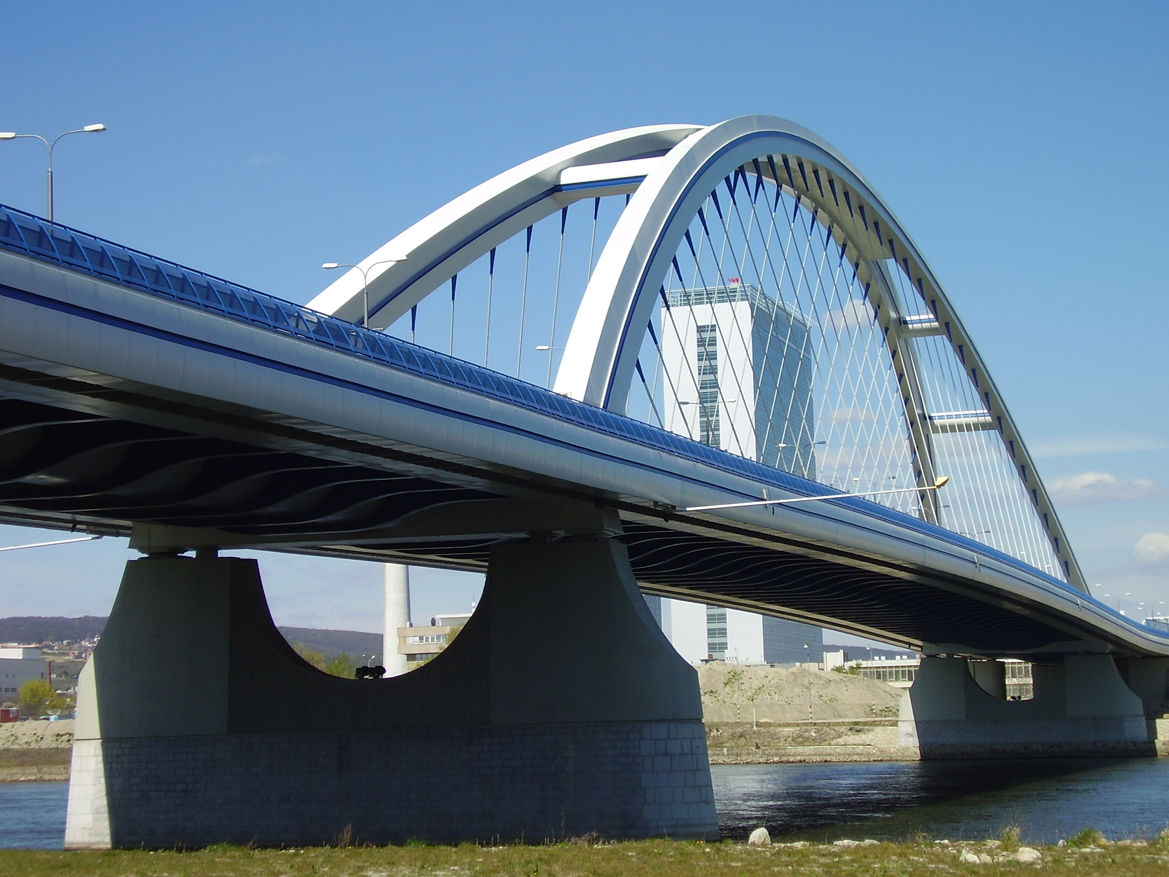 Bratislava